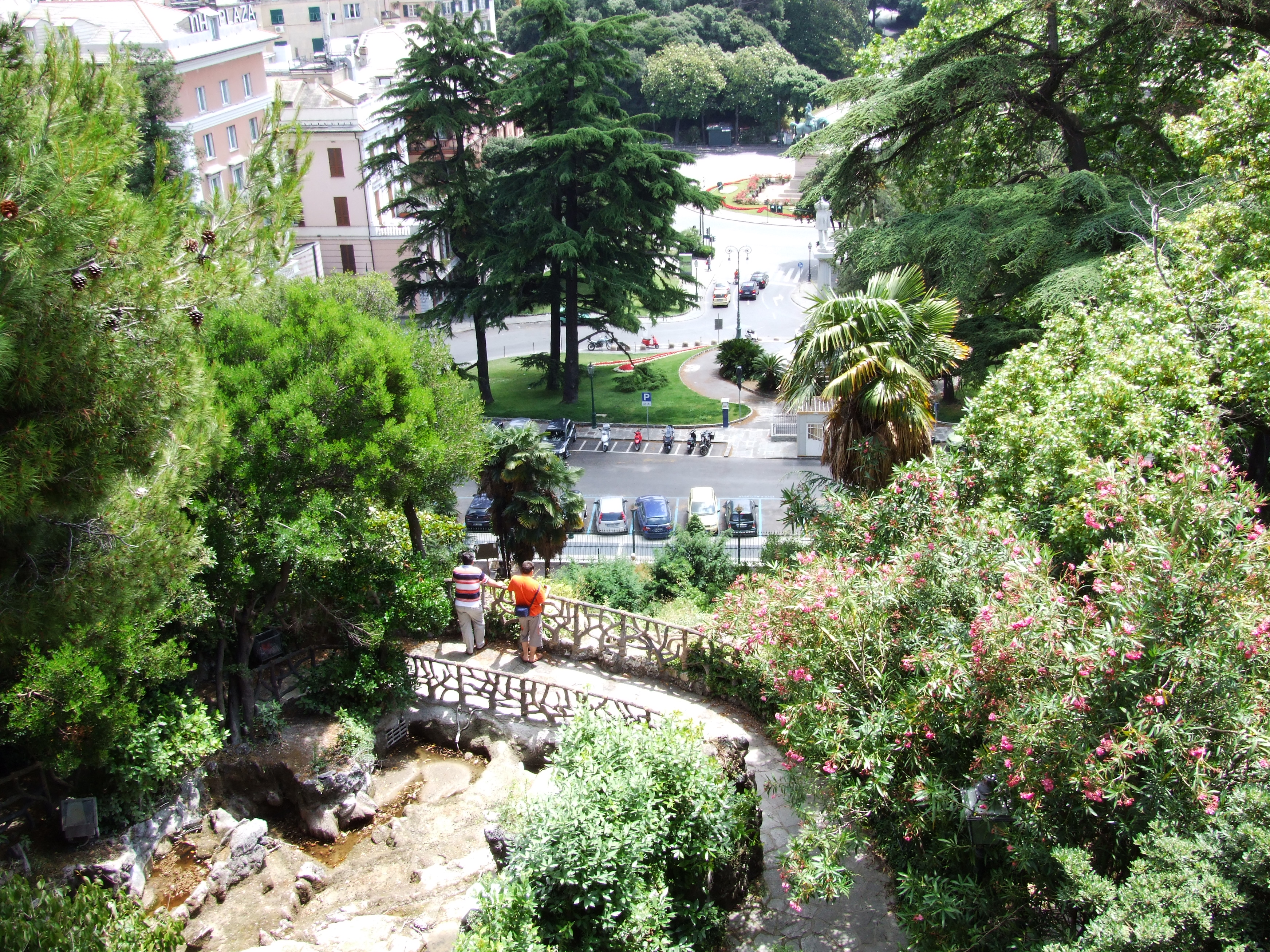 Genoa